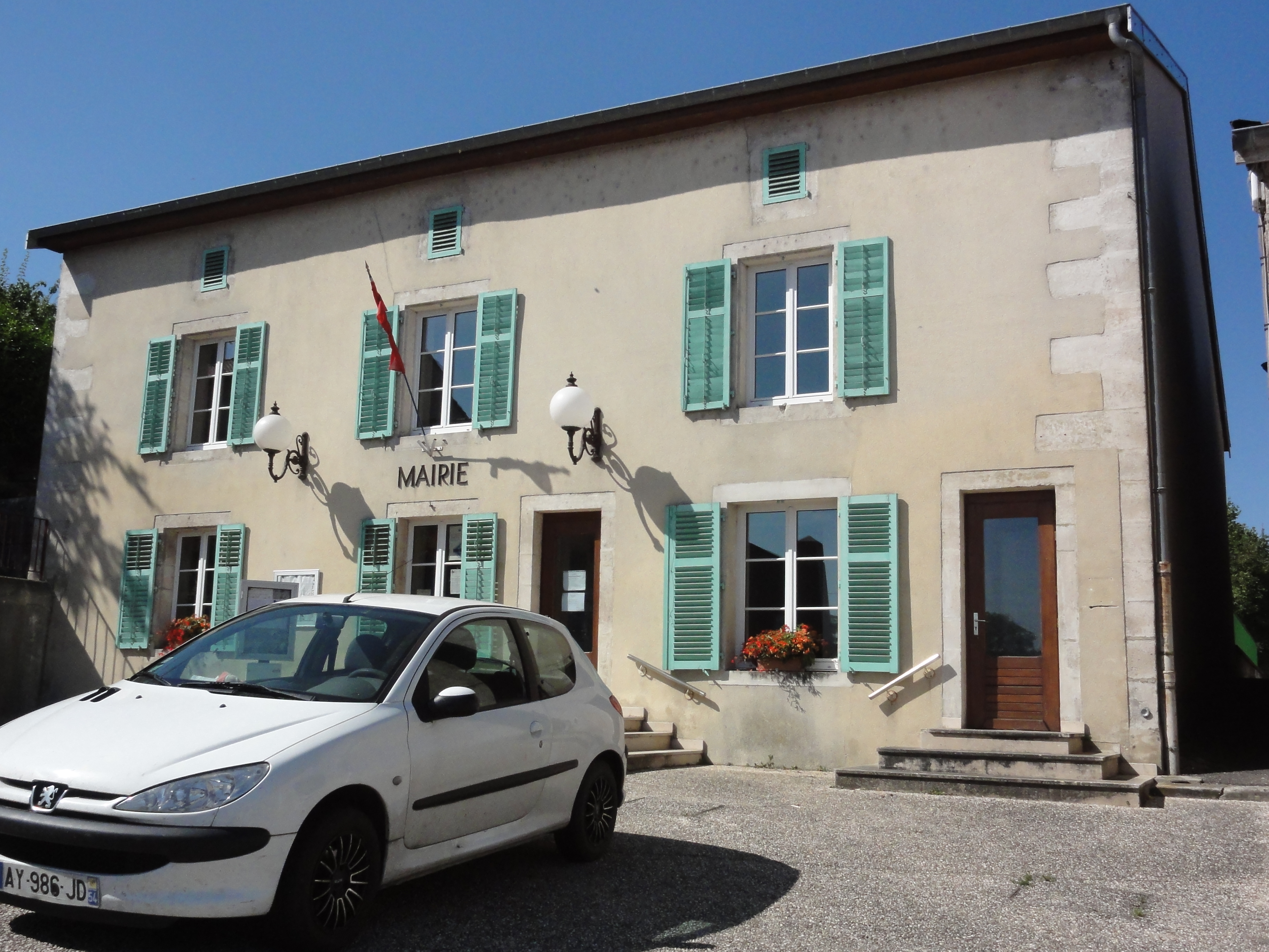 Vadonville (Meuse) mairie